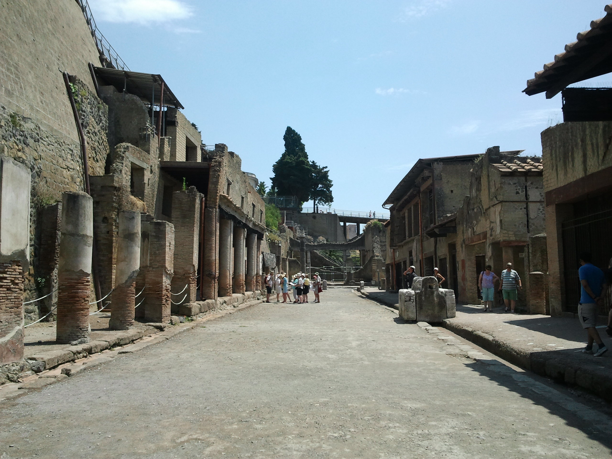 Ercolano (Herculanum), près de Naples et Pompéi